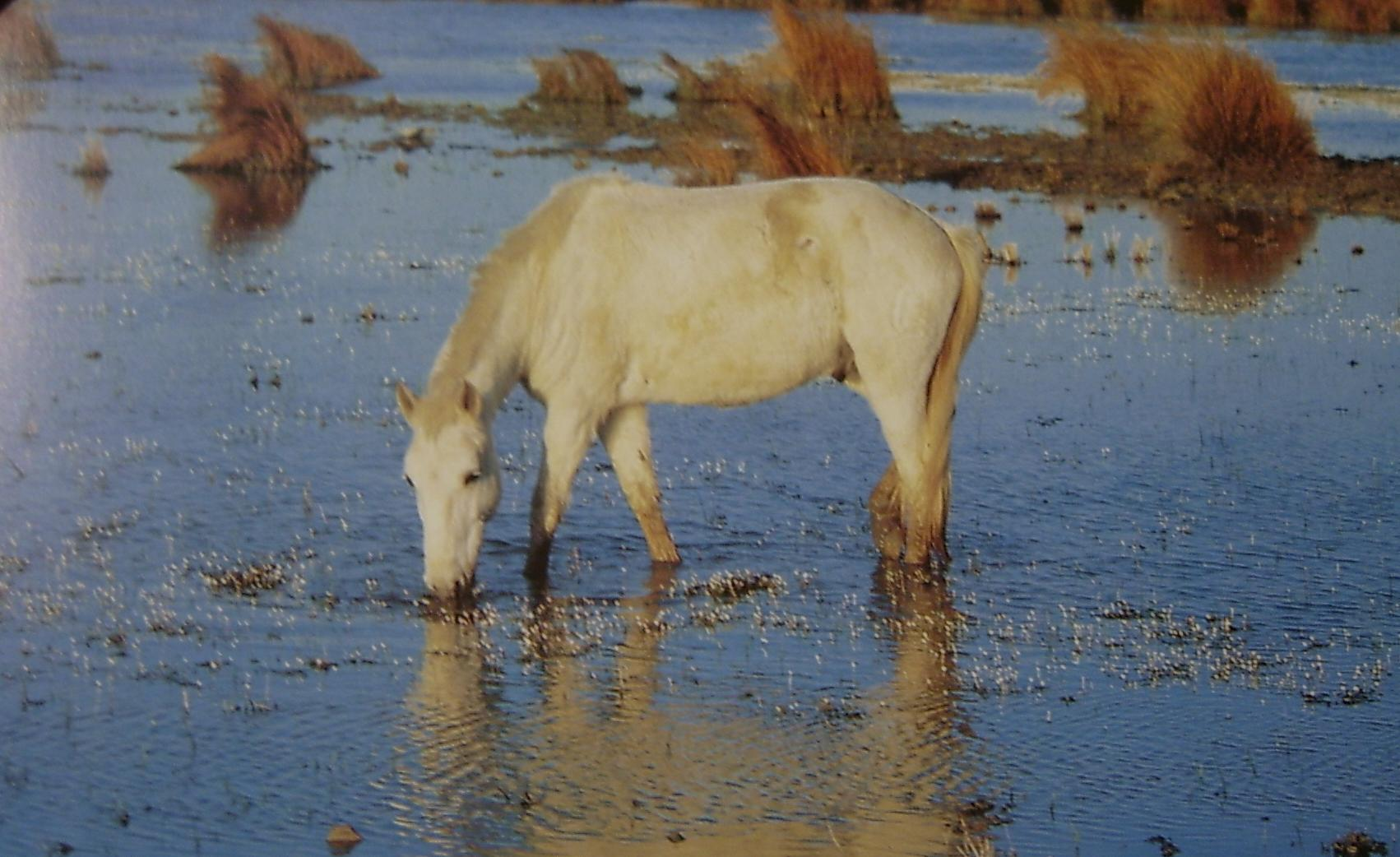 Wildpferd aus der Camargue